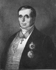 Obra da coleção Brasiliana Iconográfica.